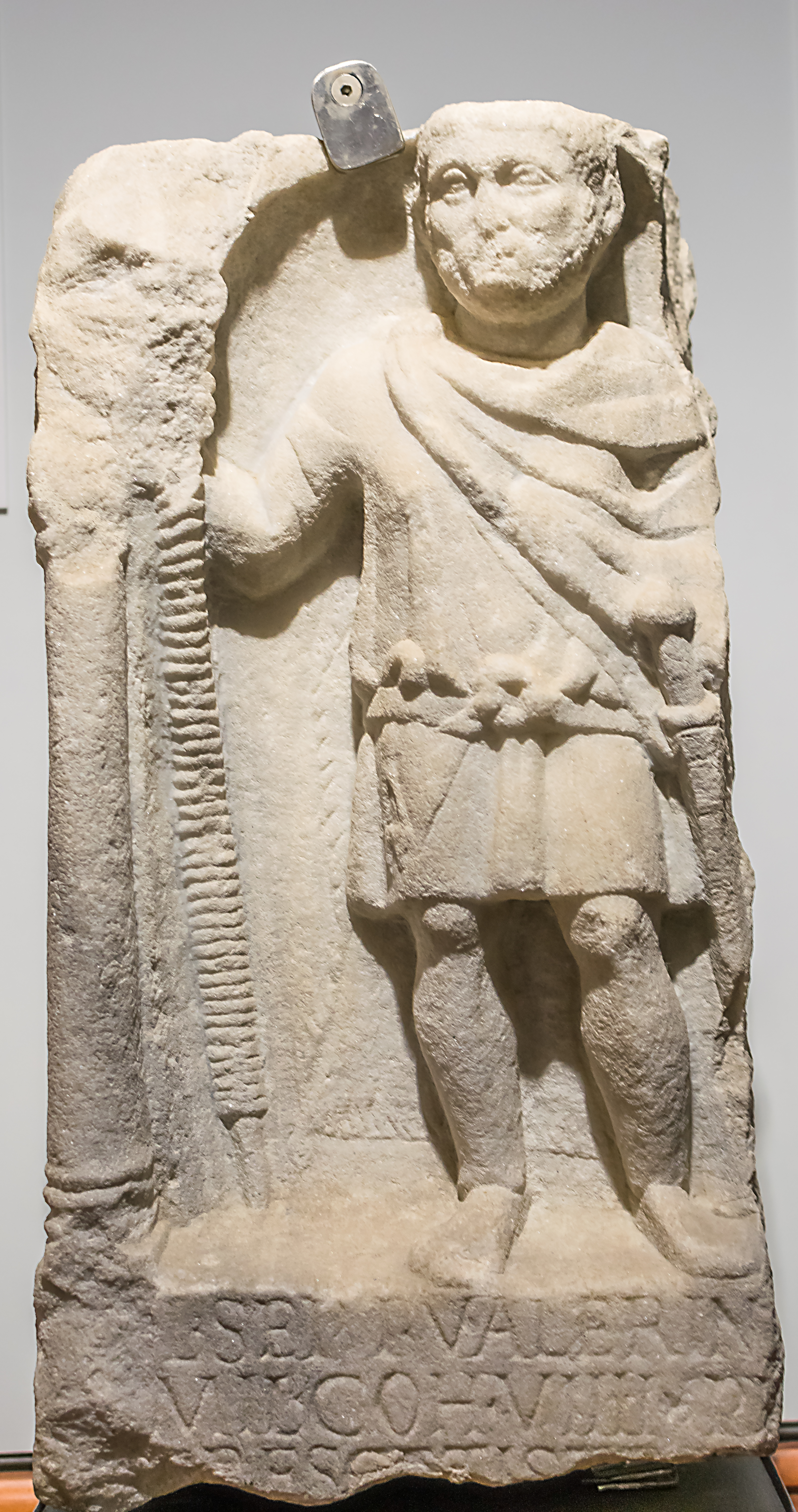 Grabaltar aus Marmor von Lucius Septimius Valerinus aus der 1. Hälfte des 3. Jahrhunderts, der ein Prätorianer der 9. Kohorte gewesen war. Die Figur ist in typischer Militärkleidung dargestellt: eine kurze Tunika mit einem Gürtel, einem Umhang, dem Pilum und dem Gladius. Der Schaft des Pilums ist mit einer Art Kordel umwickelt.